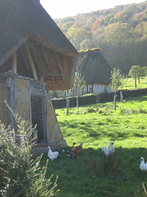 Marais-Vernier, Eure, Normandie